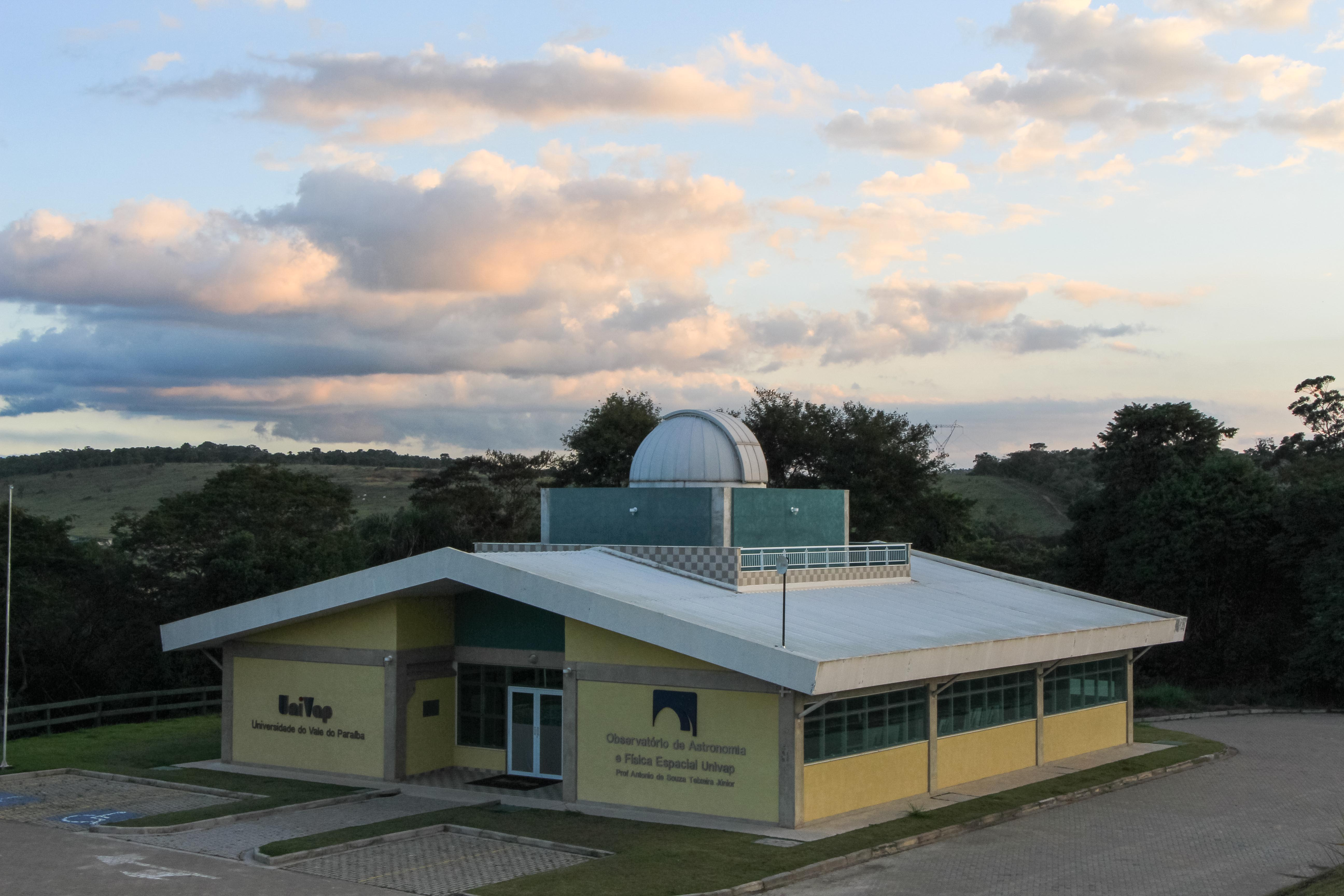 Observatório de Astronomia e Física Espacial da Universidade do Vale do Paraíba (Univap), localizada em São José dos Campos/SP.